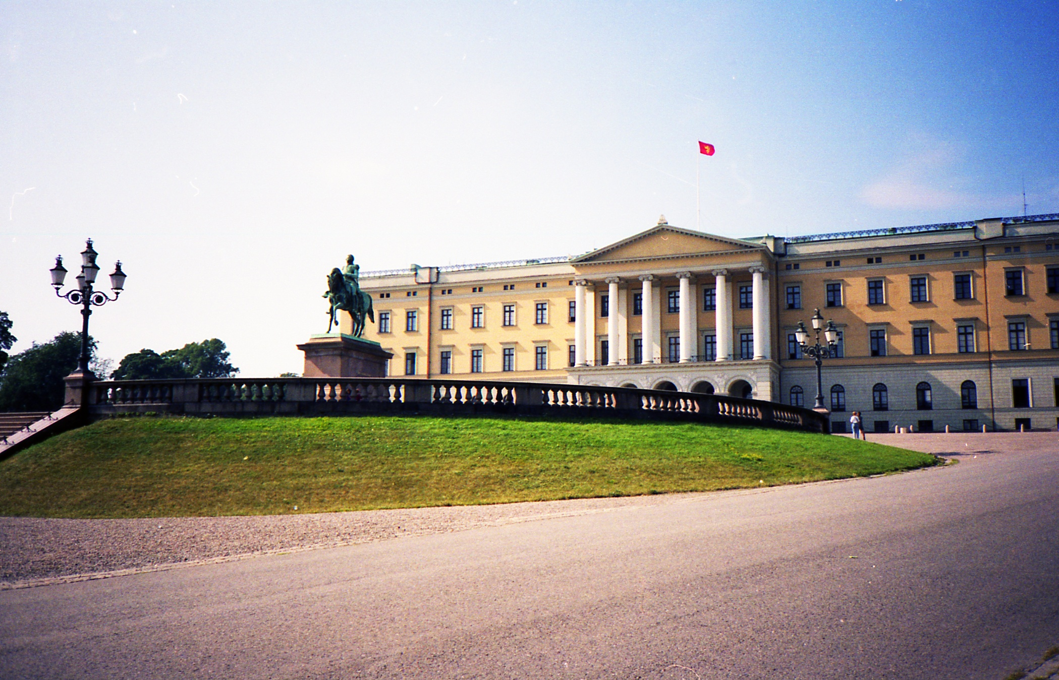 pałac królewski w Oslo